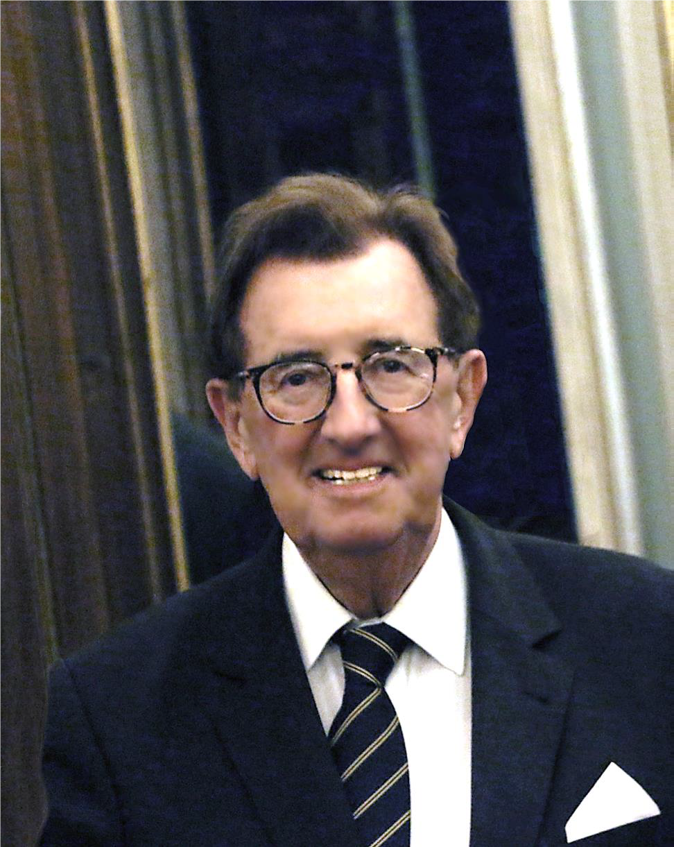 Privates Portraitfoto